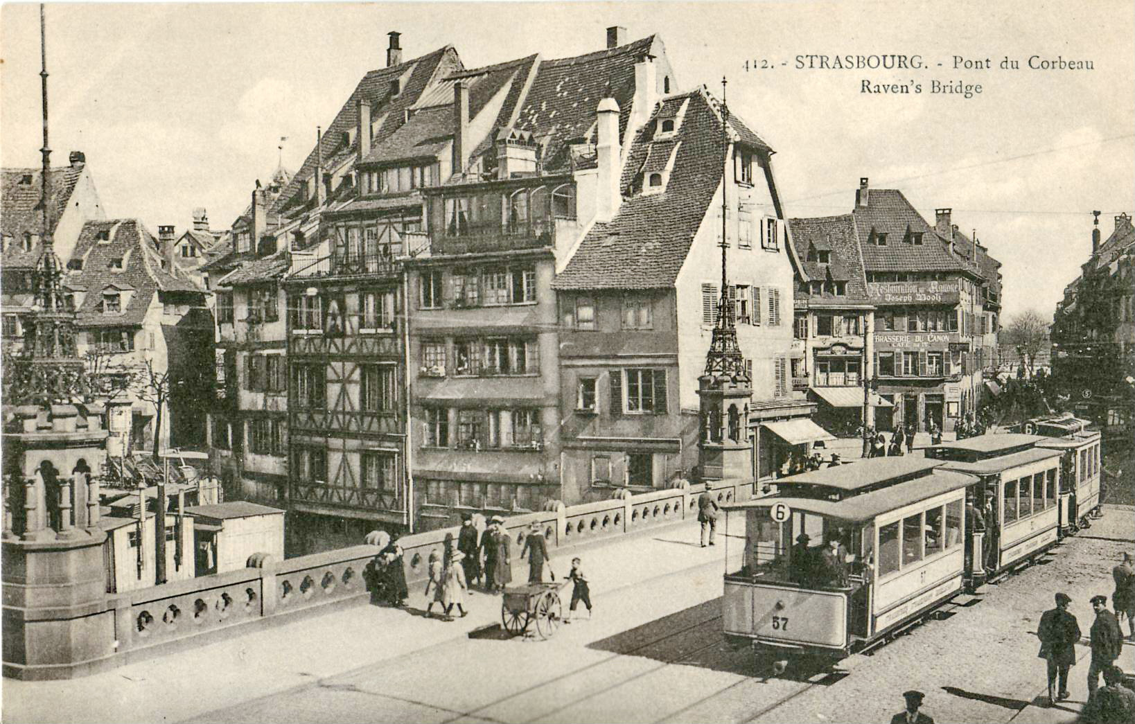 Carte postale ancienne éditée par Cigogne, n°412 : STRASBOURG - Pont du Corbeau.Tramway de la ligne 6 (Cronenbourg - Graffenstaden) sur le pont du Corbeau.